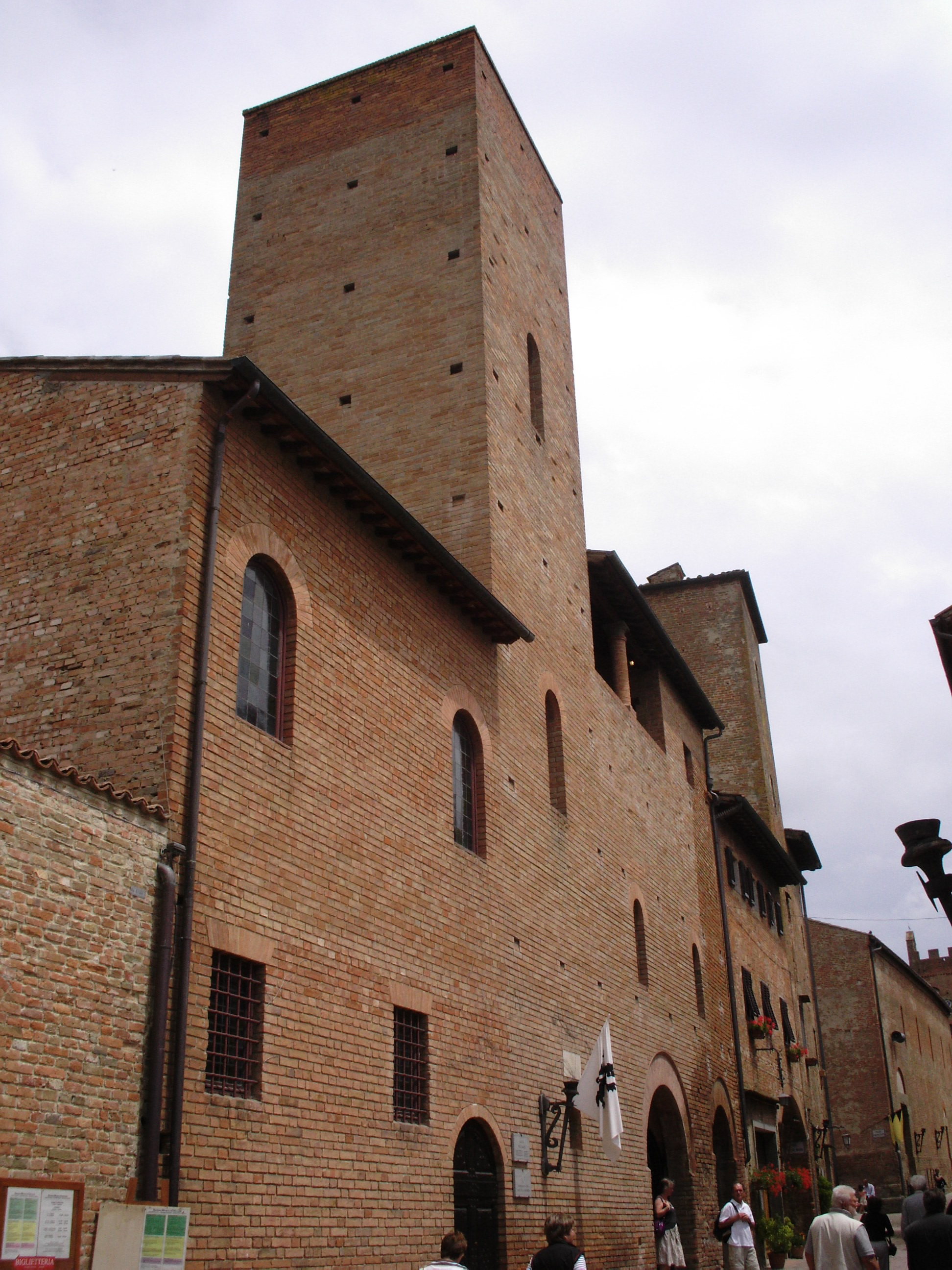 Certaldo Casa di Giovanni Boccaccio